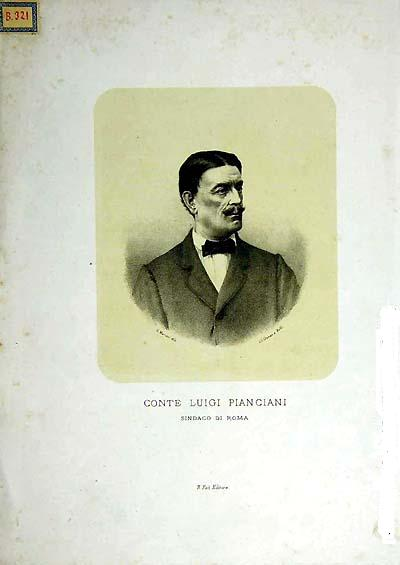 Luigi Pianciani, sindaco di Roma 1870 ca. pubblico dominio